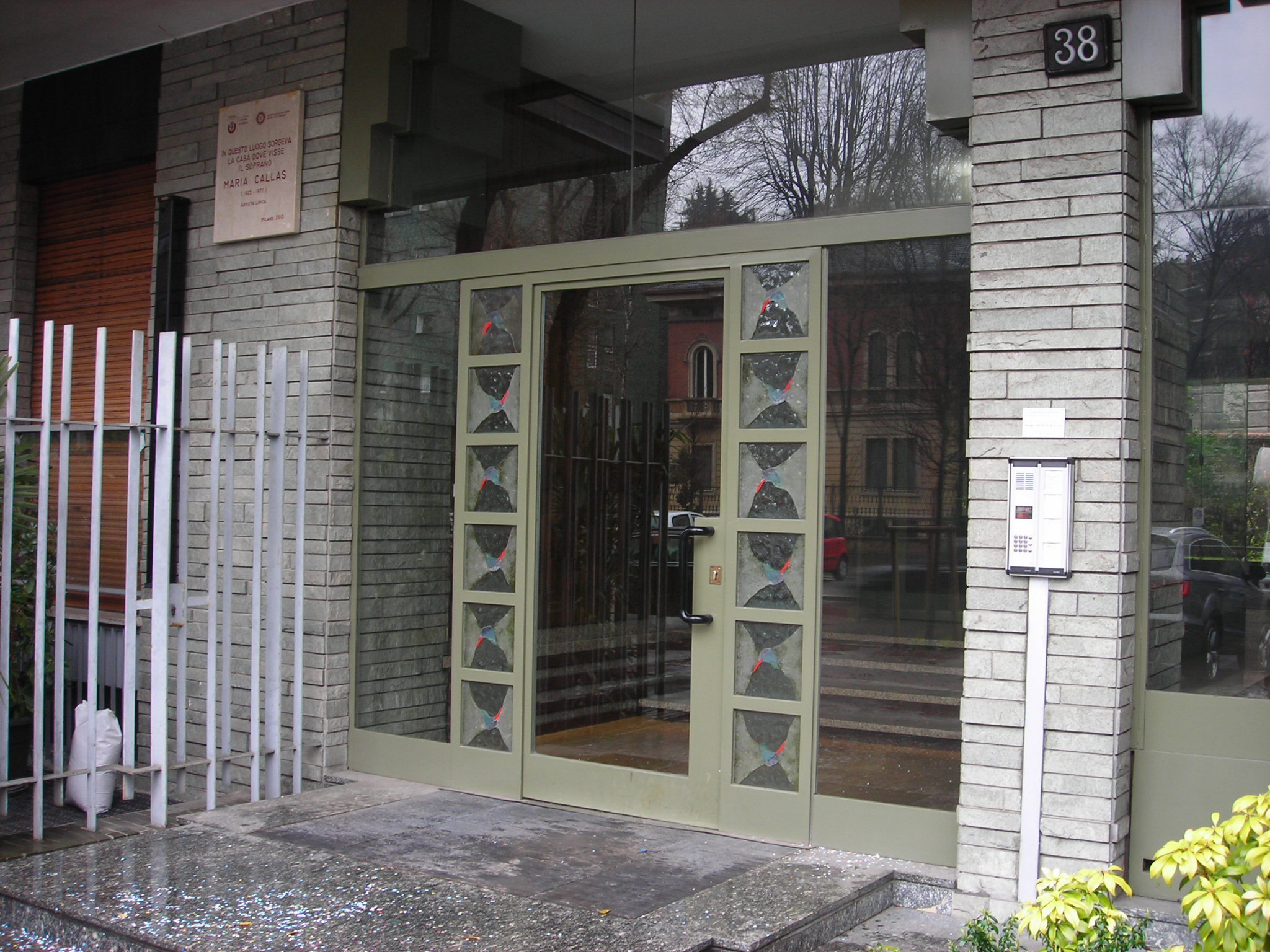 Via Buonarroti 38, Milano